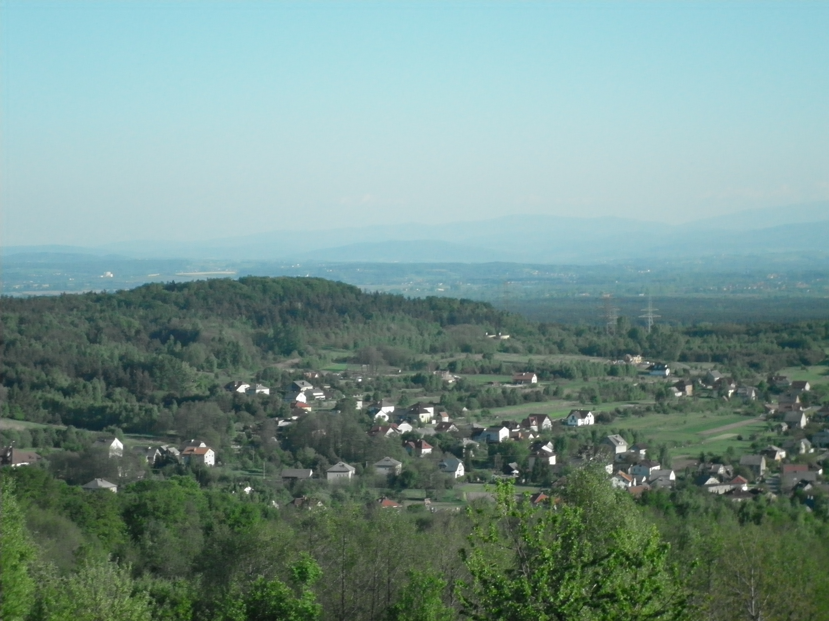 Widok na Zagórze z "gorów"